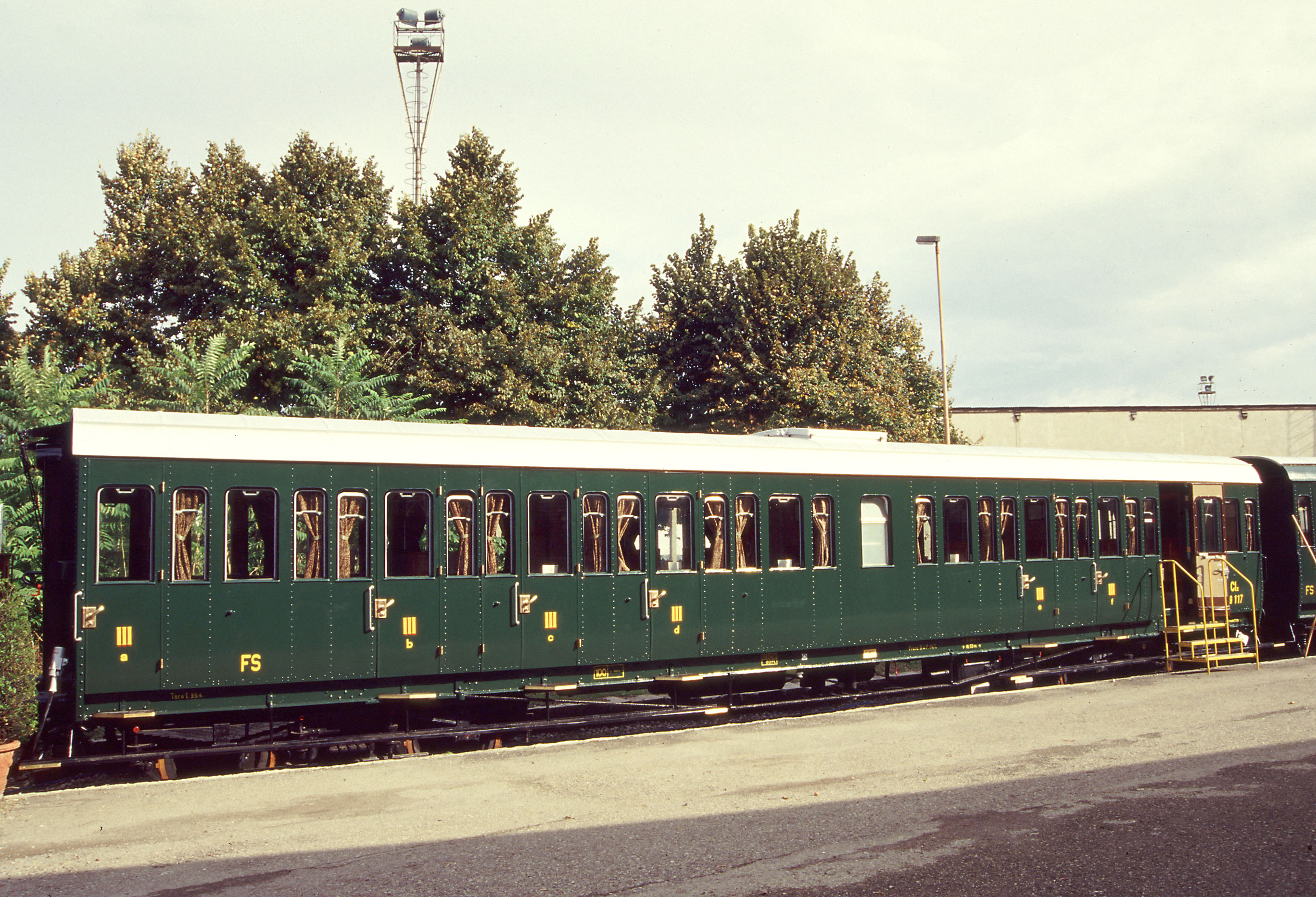 Carrozza tipo 39117 restaurata in verde vagone in mostra al Dopolavoro Ferroviario di Bologna nel 1994, autore Sandro Baldi, Bologna, Italia